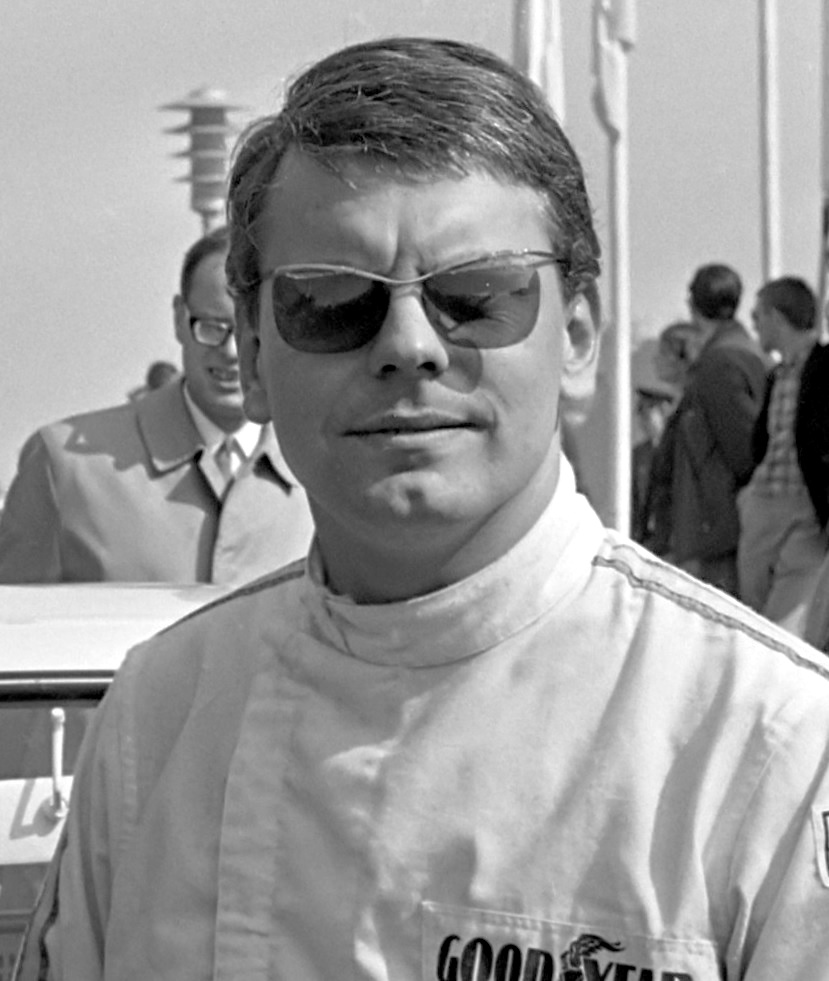 Roger Clark lors de sa victoire au Rallye des Tulipes 1968